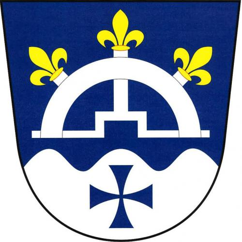 Znak,Jindřichov , okres Šumperk